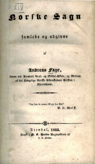 Tittelbladet til førsteutgaven av Andreas Fayes Norske Sagn, 1833.